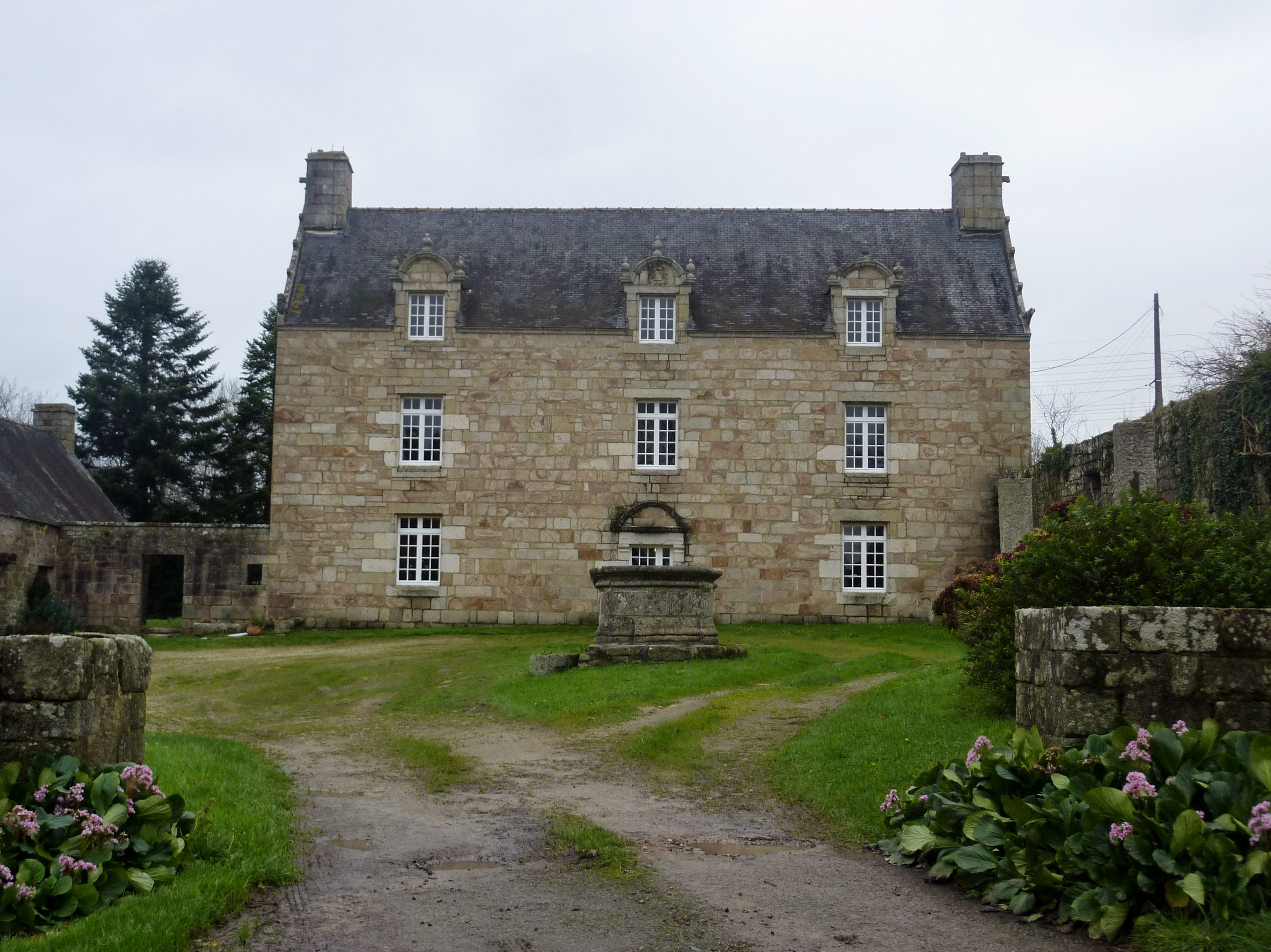 Quimper : le manoir de Keramaner, de style gothique tardif. Il faisait partie de l'ancienne paroisse de Cuzon, rattachée à celle de Kerfeunteun.